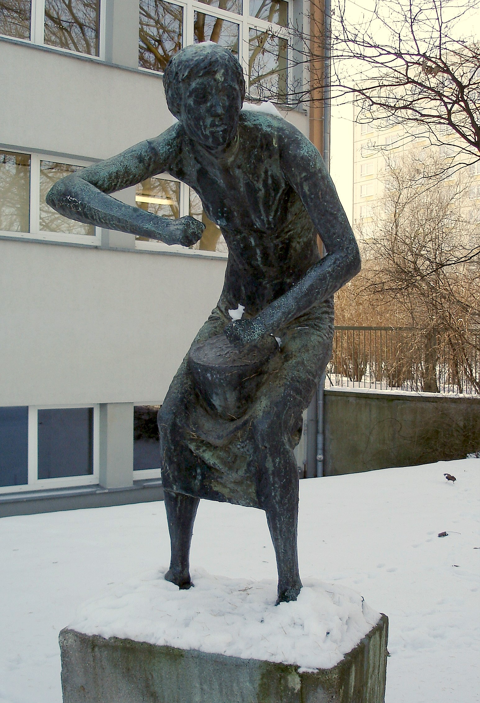 Plastik der trommelnden stummen Kattrin aus Brechts Mutter Courage von Johannes Peschel vor der ehemaligen 18. Grundschule in Dresden.